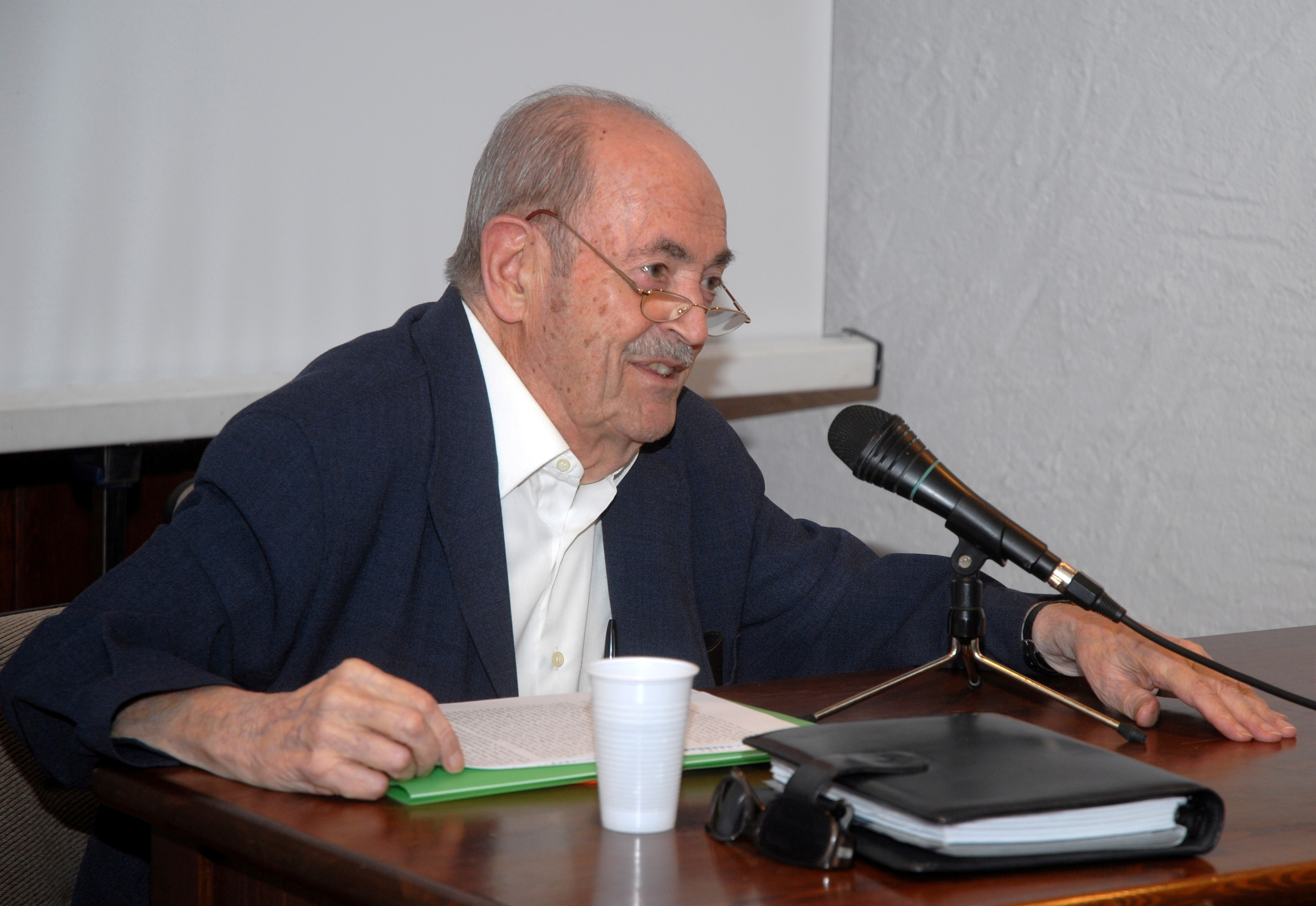 Jaime Truyols Santonja, conferencia en agosto de 2008